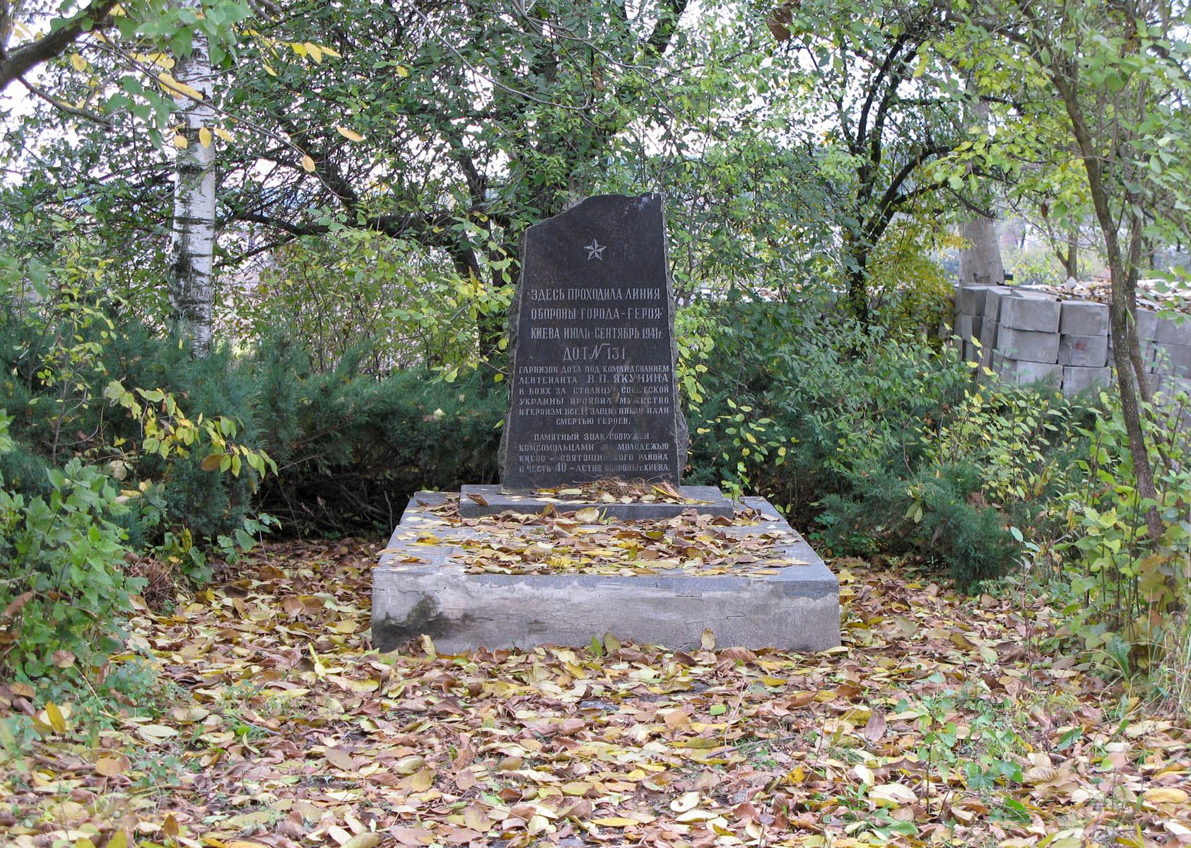 Памятник гарнизону лейтенанта Якунина в Кременище